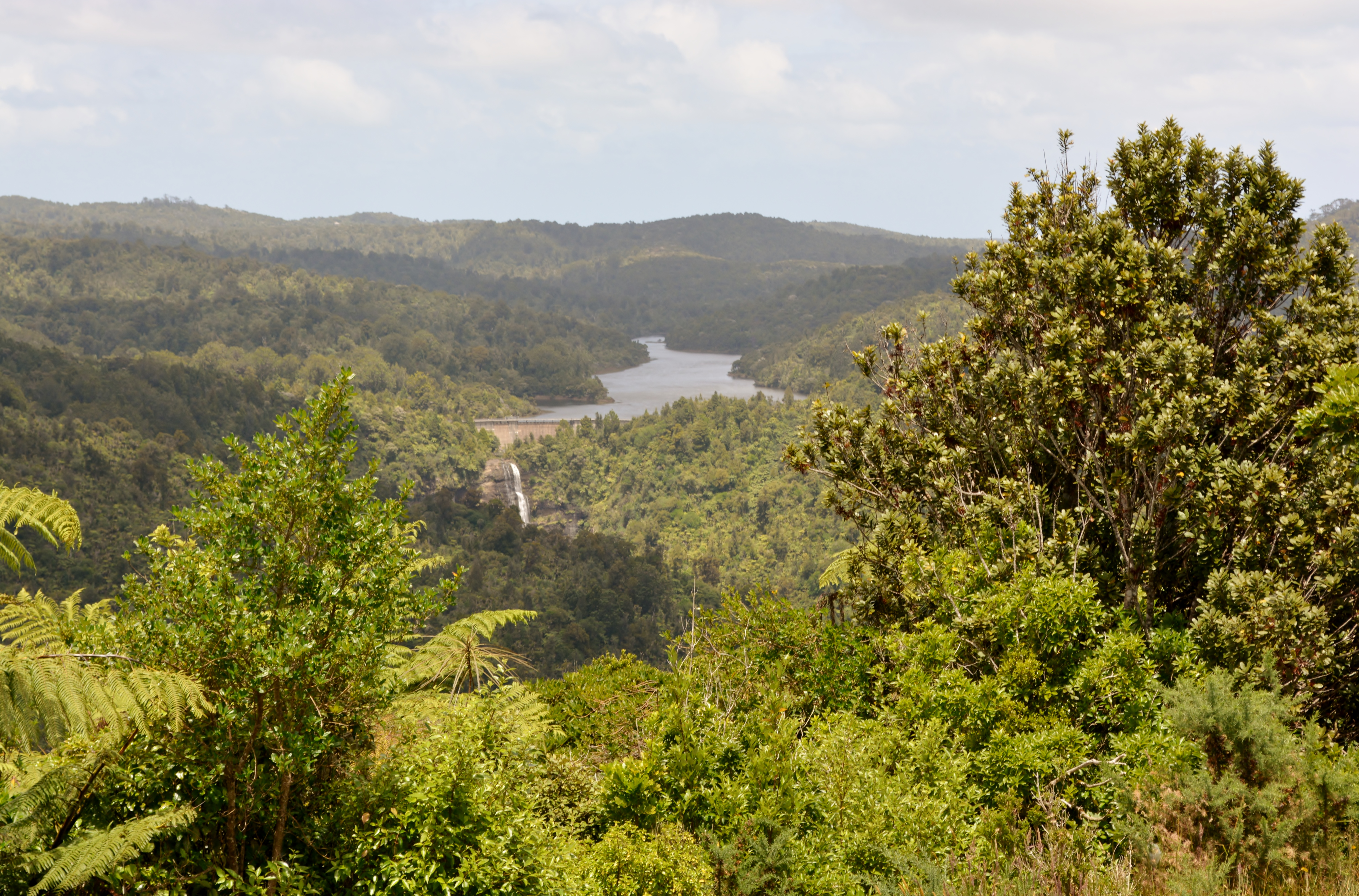 Waitakere Dam & Waterfall,Waitakere Ranges.Auckland NZ.